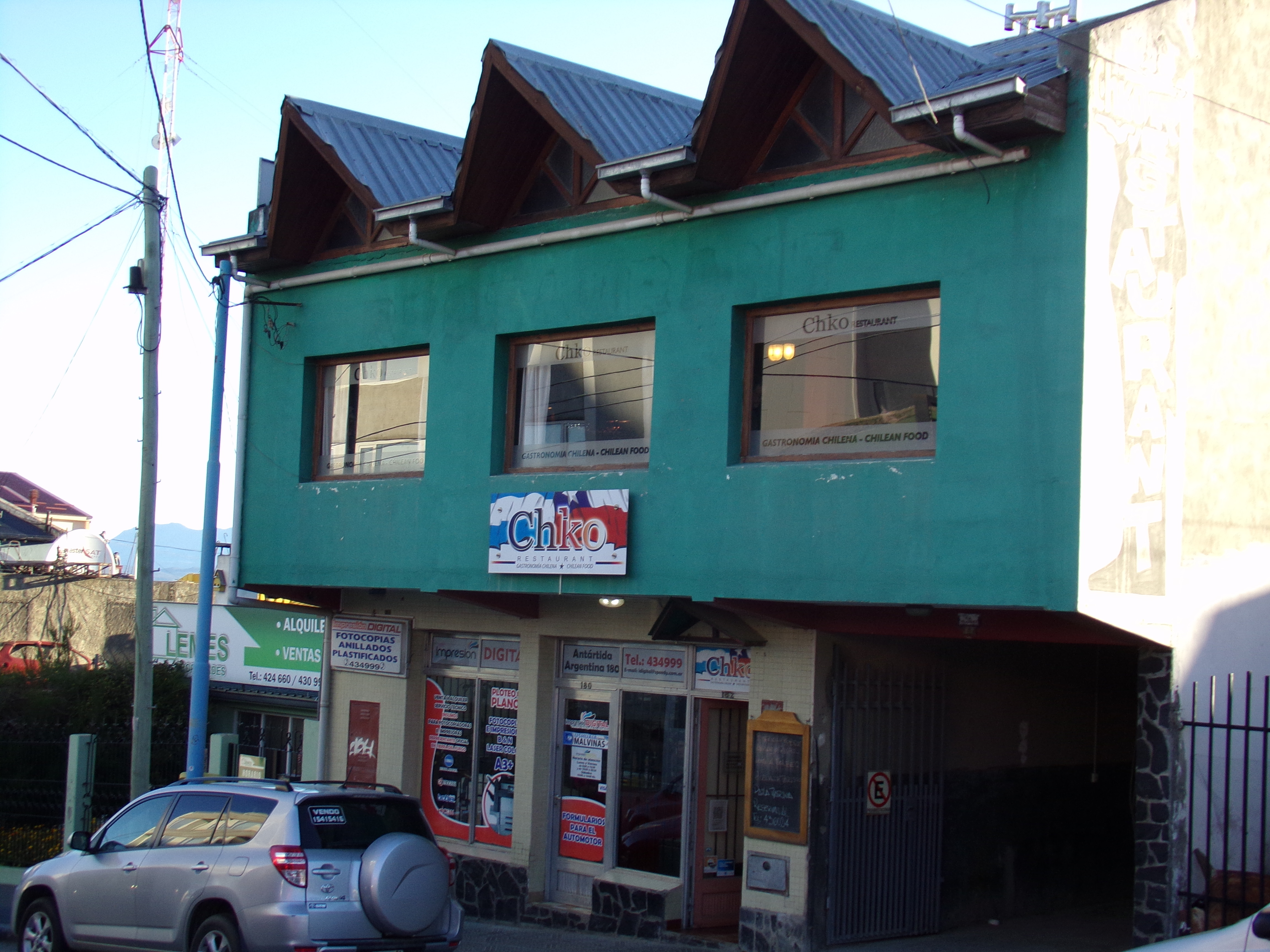 Restaurante chileno en Ushuaia, Argentina